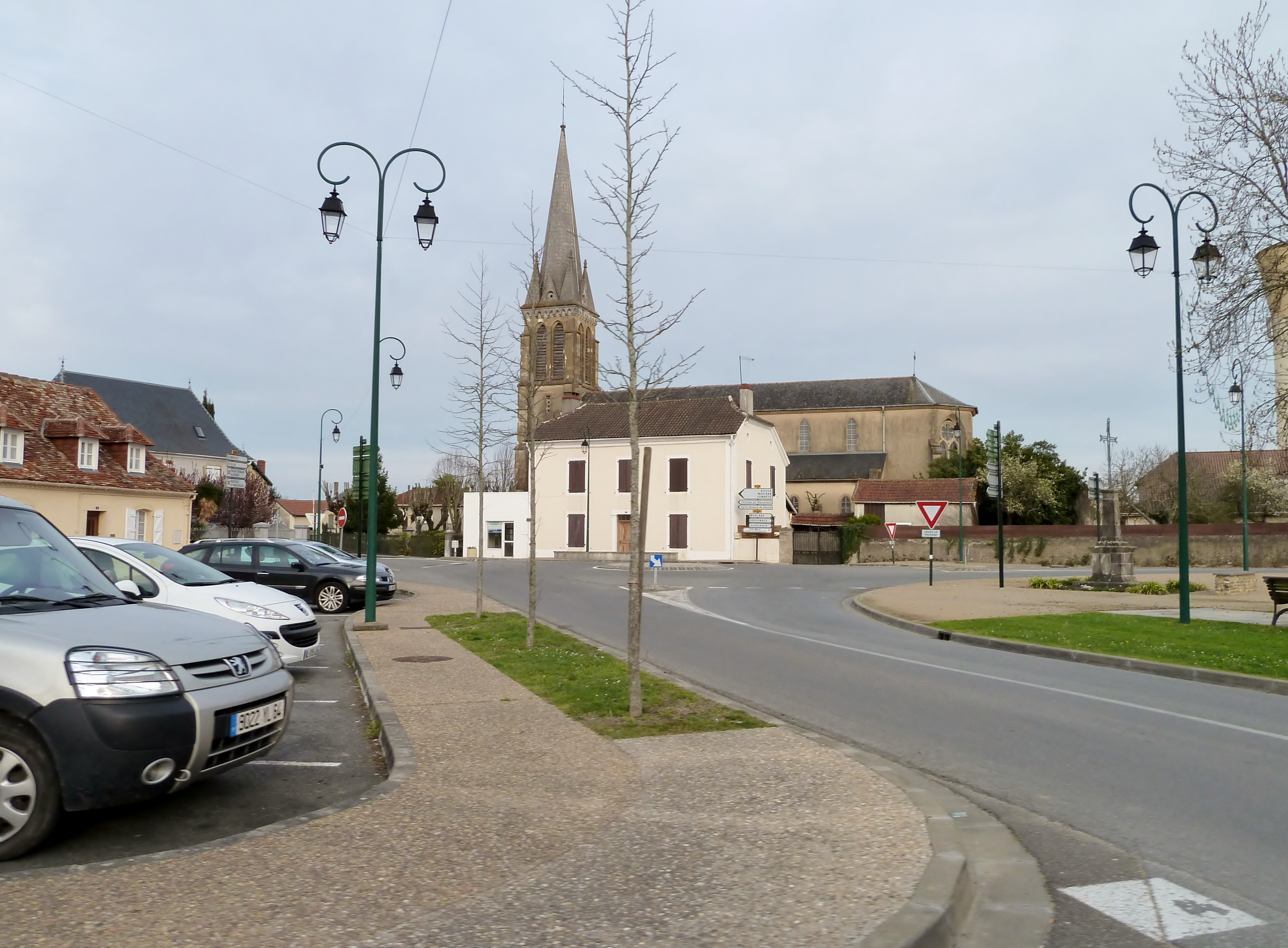 Garlin